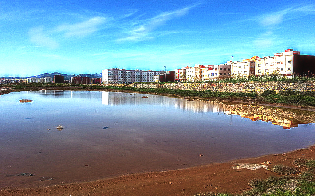 Nador, Morocco